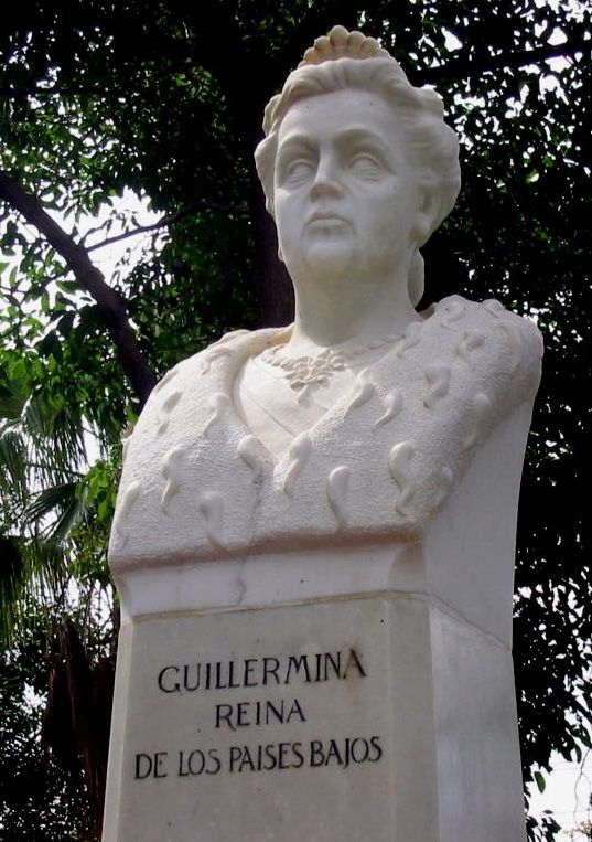 Zelf gemaakte opname, locatie: op of (zeer) nabij Plaza Reina Guillermina (het is in een parkje naast een zo genoemd plein) Maracaibo, Venezuela.